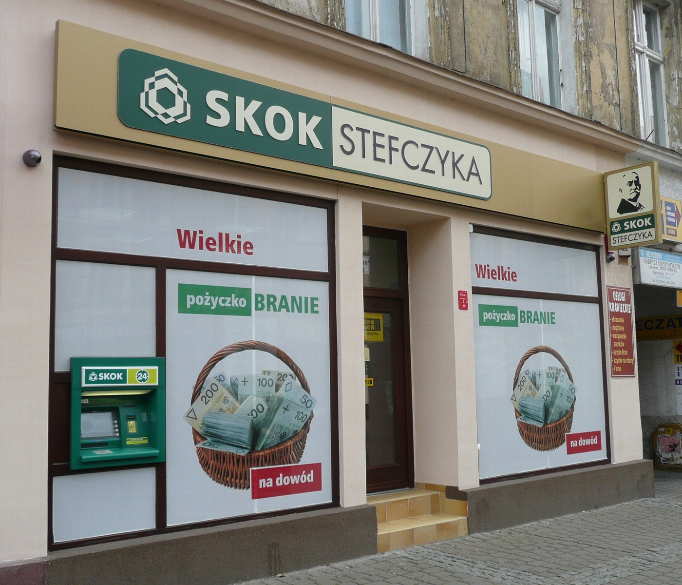 Oddział SKOK Stefczyka w Bydgoszczy, ul. Gdańska 22